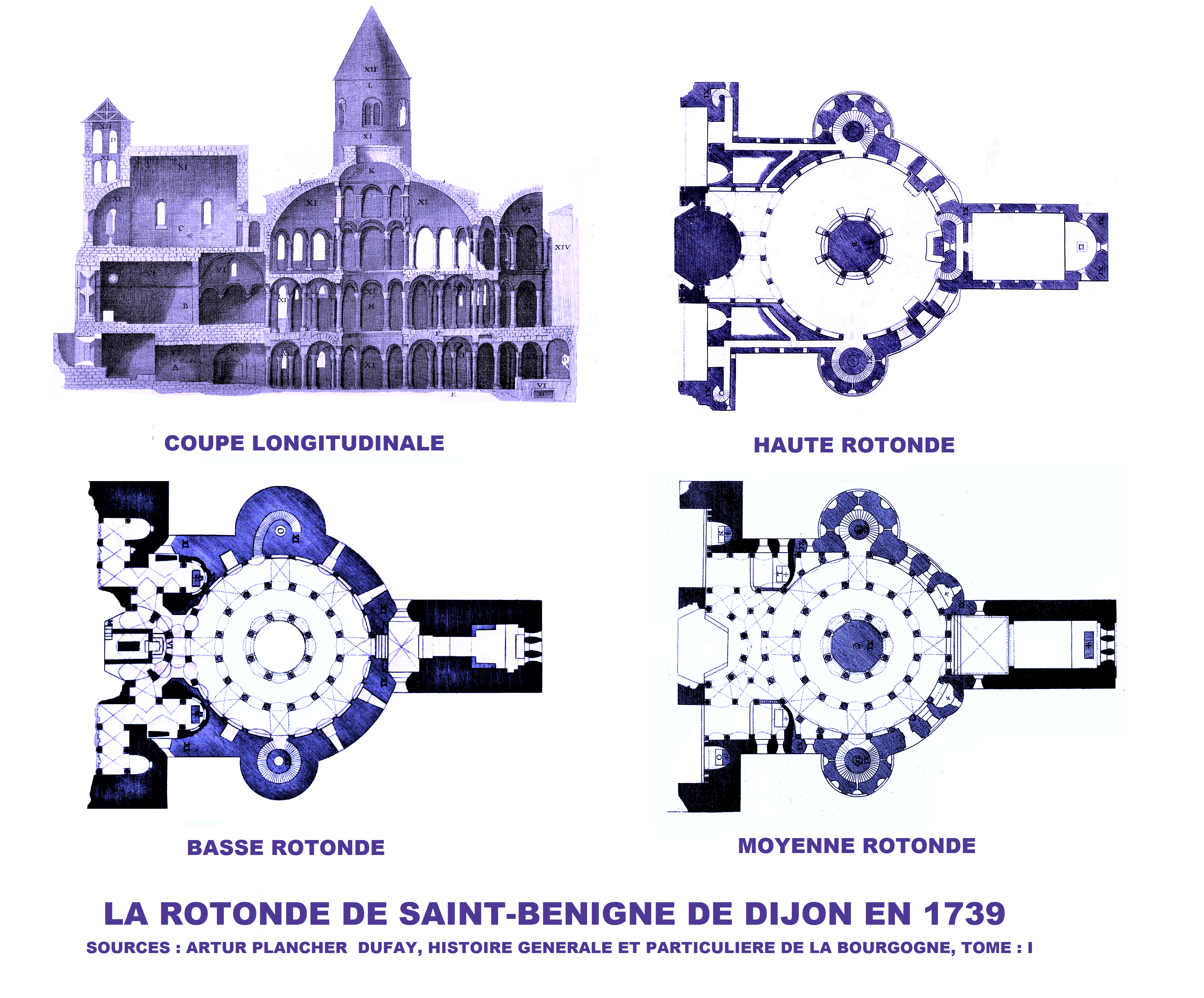 Eglise Saint-Bénigne de Dijon, Plans et coupe de la rotonde en 1739 (images du domaine public modifiées)